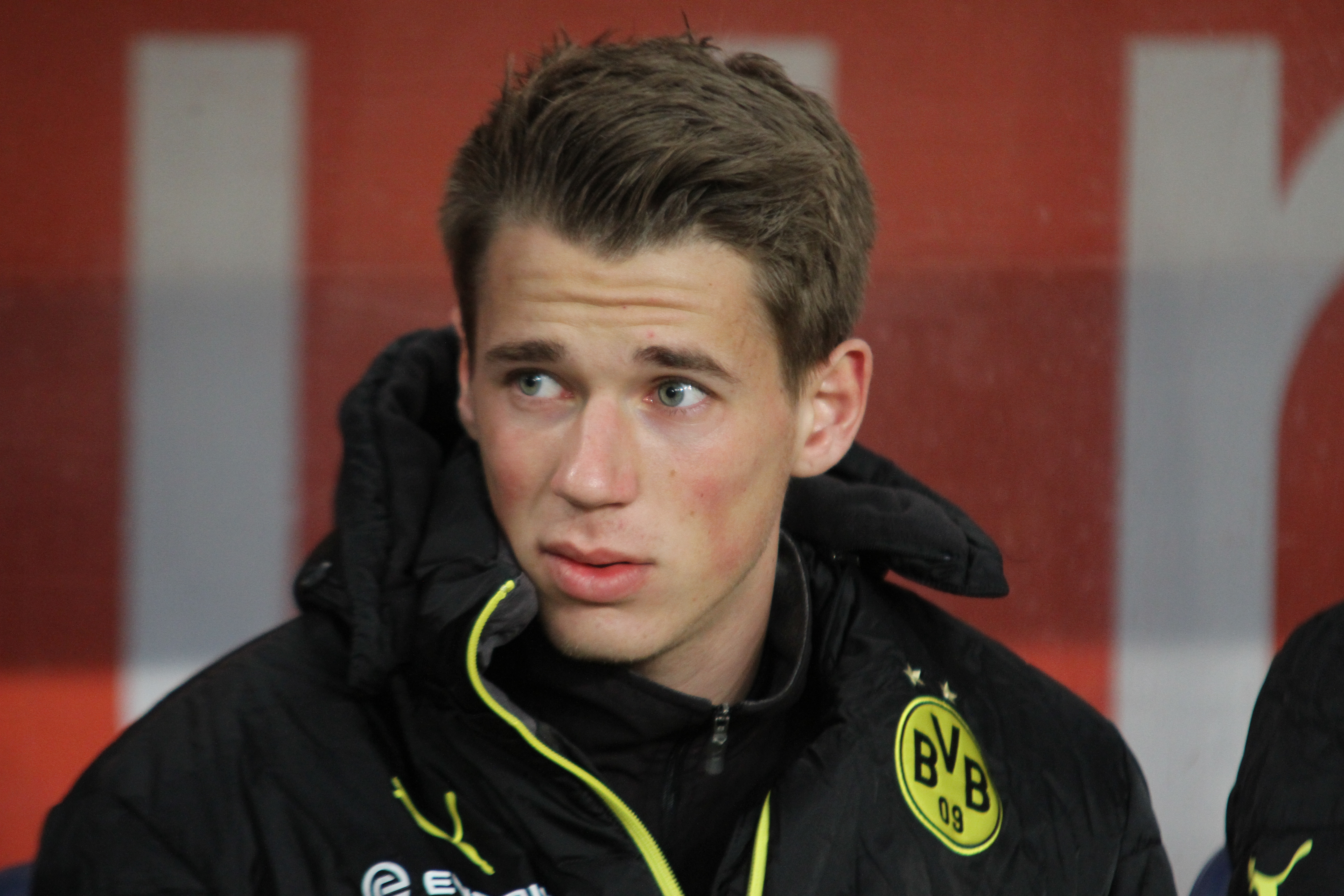 Erik Durm (Borussia Dortmund)